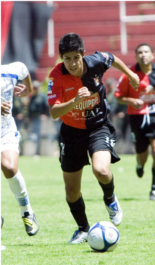 jesus arismendi de correo peru